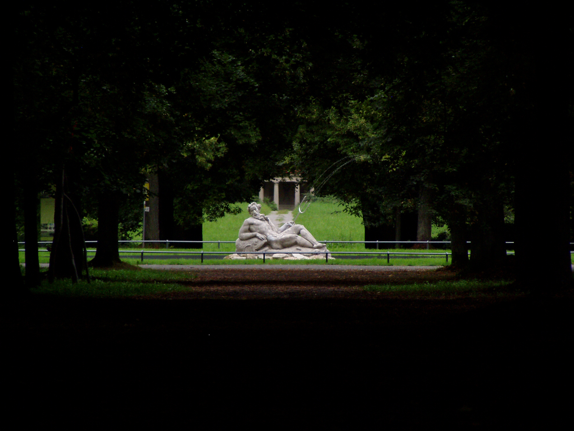 Der Neptunbrunnen, Zentrum des Schlossparks auf dem Schwanberg bei Rödelsee